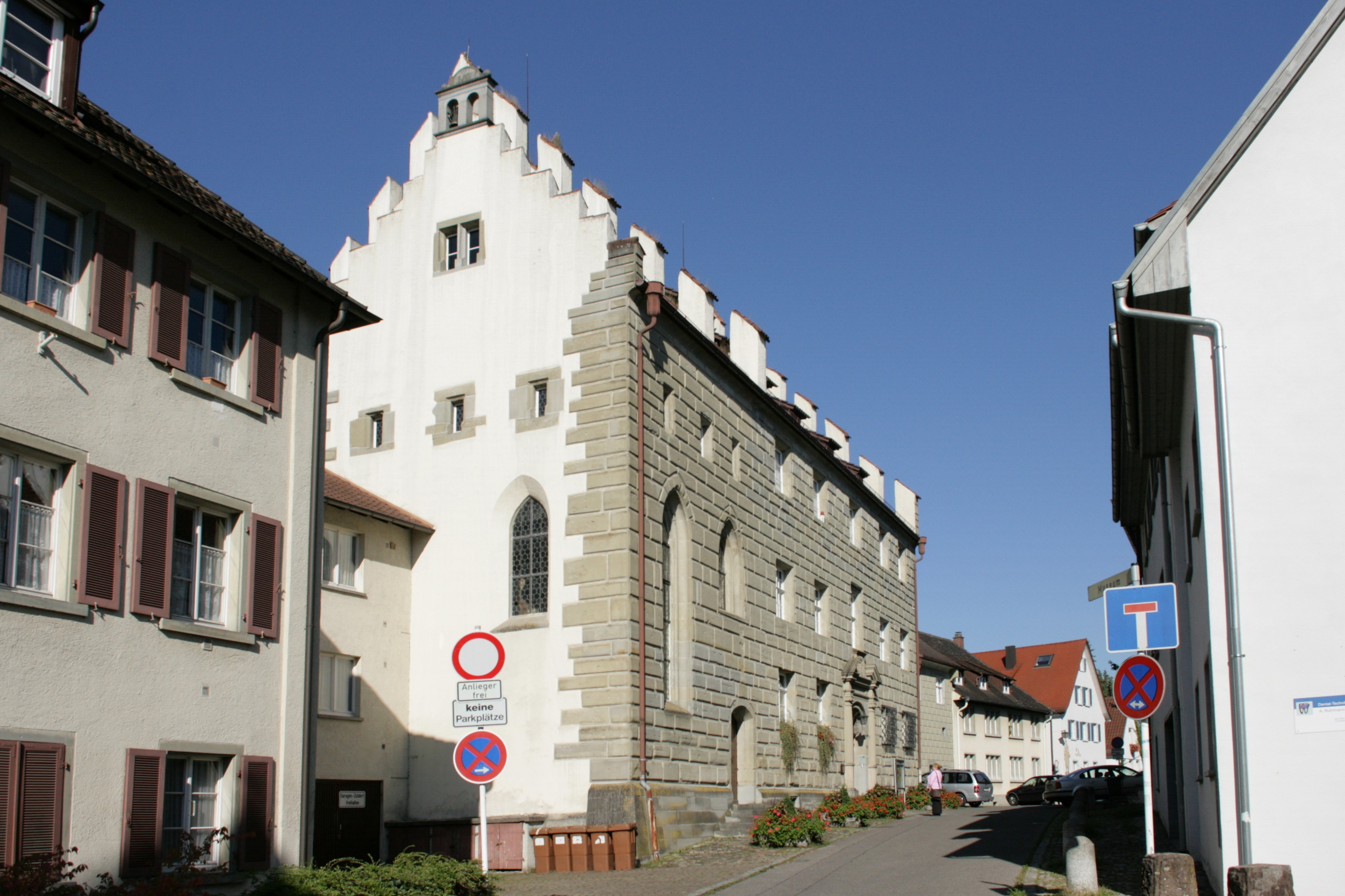 Städtisches Museum Überlingen, Krummebergstraße 30 in Überlingen